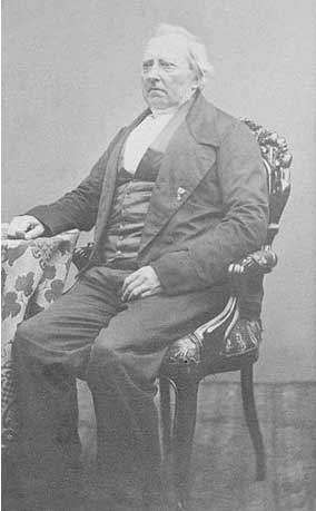 Portret van Herman Johan Engelkens (1797-1884)